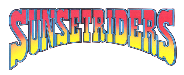 Logo des Videospiels Sunset Riders von Konami